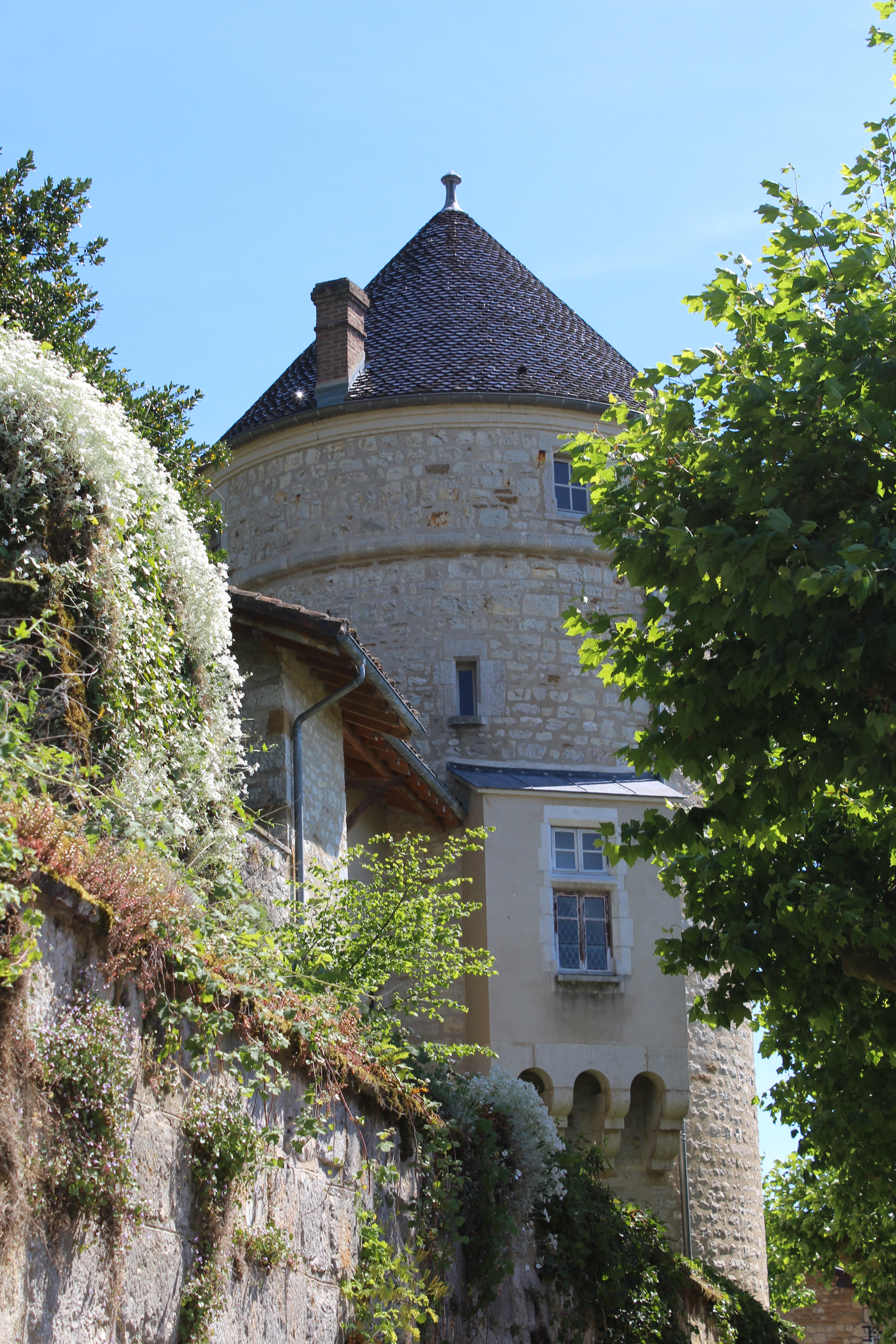 Château de Treffort, Val-Revermont.